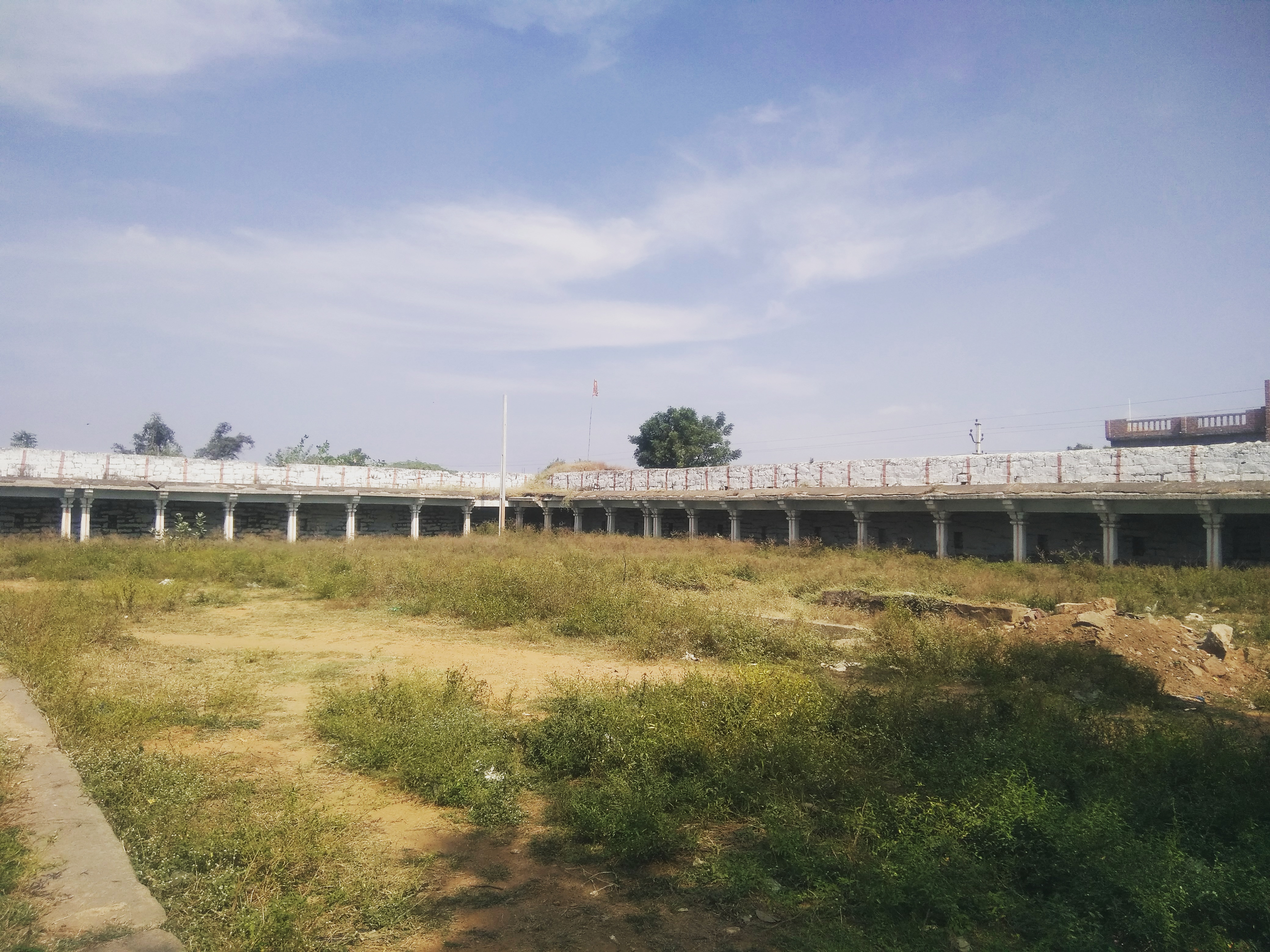 అక్కన్న మాదన్న గడికోట -మహేశ్వరం: మహేశ్వరం లో గల కోదండ రామస్వామి దేవాలయం వెనుక అక్కన్న మాదన్నల కచేరి కేంద్రం ఉంటుంది .నాలుగొందల సంవత్సరాల క్రితం క్రీ.శ 1658 నుంచి 1687 వరకు గోల్కొండను పాలించిన అబూహసన్ తానీషా కాలంలో ఇదే ఊరిలో ఆయన మంత్రులు అక్కన్న మాదన్నలు తిరుగాడేవాళ్లు. విడిది కోసం తరుచూ మహేశ్వరానికి వచ్చేవారు. భద్రాచలం నిర్మాణానికి ముఖ్యపాత్ర వహించిన అక్కన్న, మాదన్నలు, కంచర్ల గోపన్నలతో మహేశ్వరం ప్రత్యేక అనుబంధాన్ని కలిగి ఉన్నది. అక్కన్న మాదన్నల తండ్రి భానూజీ పంతులు మహేశ్వరం పక్కన ఉన్న హన్మకొండలో శిస్తులు వసూలు చేసే అధికారి. ఆయన అక్కన్నపల్లి, మాదన్నపల్లి, భానుపురం అనే మూడు గ్రామాలను నిర్మించాడు. ఈ రోజు అవి అకాన్‌పల్లి, మన్‌సాన్‌పల్లి, సుభాన్‌పల్లిగా వాడుకలో ఉన్నాయి. అక్కన్న మాదన్నలు ఈ ప్రాంతంలో 108 దేవాలయాలు కట్టించారు. అందులో ఒకటి మాంఖాల్ మహేశ్వరంలోని రాజరాజేశ్వరాలయం. ఈ గడిలో రాముడు లేని గుడి.ఒక మూలన అమ్మవారి చిన్న గుడి మరియు ఆ పక్కనే గడిలో అలనాటి మసీదు.. ఇంకోపక్క గడిలో ఒక పాఠశాల ఉంటుంది. అక్కన్న మాదన్న ఘడికోటలో మైసమ్మ బోనాలు అత్యంత వైభవంగా జరుగుతాయి. భక్తులు వేల సంఖ్యలో అమ్మవారికి బోనాలు సమర్పించుకుని మొక్కులు తీర్చుకుంటారు.భక్తులు సాయంత్రం సామూహిక ఊరేగింపుగా వచ్చి అమ్మవారికి బోనాల నైవేద్యం సమర్పిస్తారు.. ఊరేగింపులో గంగపుత్రుల జాలమందిళ్ళుల పోతురాజుల విన్యాసాలు, శివసత్తుల పూన కాలు, బ్యాండు మేళాలు, డప్పుల దరువులు,ప్రత్యేక ఆకర్షణగా నిలుస్తాయి. ప్రయాణ మార్గం: హైదరాబాదుకి సుమారు 27 కిలోమీటర్ల దూరంలో ఉన్న ఈ మహేశ్వరం గడీకిి బస్సు మార్గం మరియు ప్రైవేటు వాహనాల ద్వారా చేరుకోవచ్చు.హైదరాబాద్ లోని చార్మినార్, కోఠి,ఇబ్రహీంపట్నం,చాంద్రాయణగుట్ట ,రాజేంద్రనగర్ నుండి మహేశ్వరానికి ఆర్టీసీ సదుపాయం ఉంది. Ancient Gadikota Fort Maheshwaram, Telangana 501359